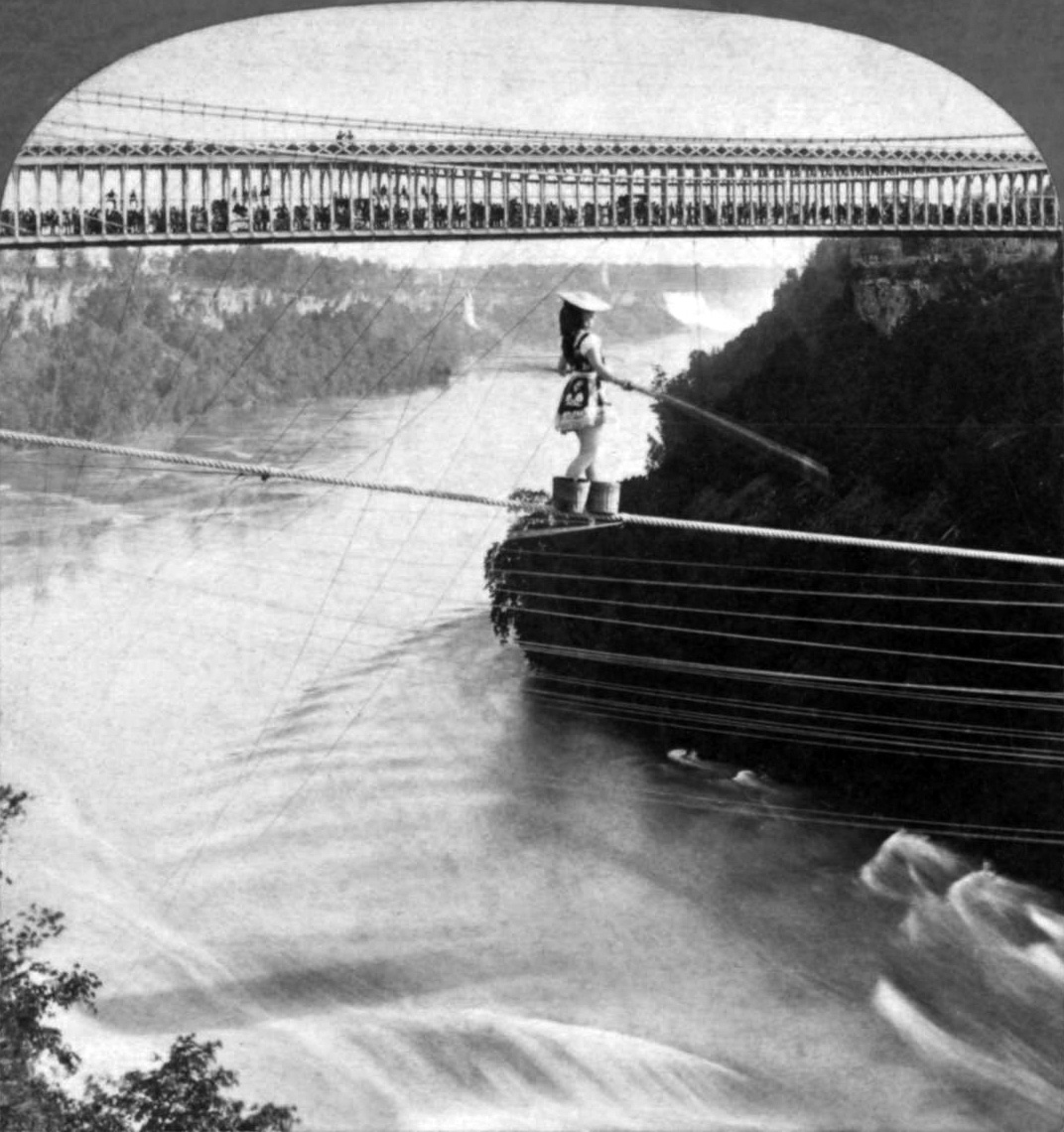 Left frame of stereograph